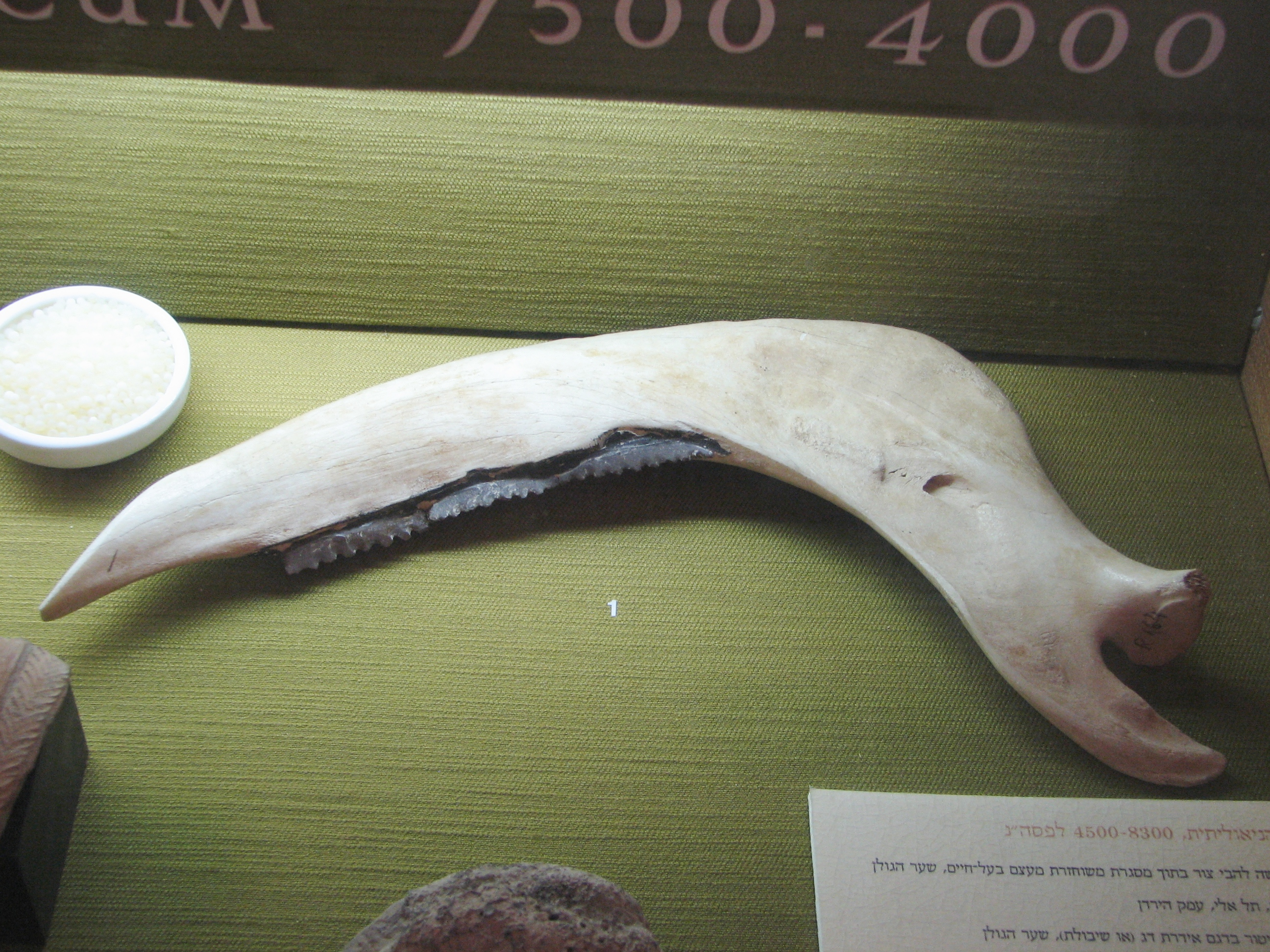 Dagon Museum, Downtown, Haifa, Israel The Museum is dedicated to the history of grain products מוזיאון דגון בעיר התחתית בחיפה שוכן במבנה המשרדים של ממגורות דגון. המוזיאון מוקדש לתולדות הדגן ומוצריו, וכלל ממצאים ארכאולוגים הקשורים בנושא וכן דגמים של מתקנים שונים בהם משתמשים בממגורות דגון מגל שלושה להבי צור בתוך מסגרת משוחזרת מעצם בעלי חיים משער הגולן, התקופה הניאוליתית